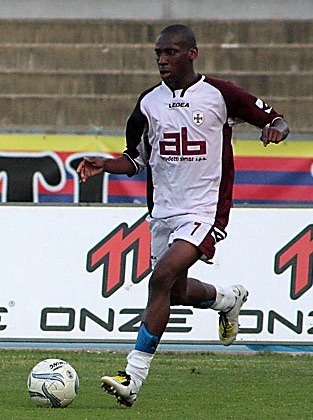 Stephane Coquin, Associazione Sportiva Dilettantistica San Felice A.C. Normanna, 2007-2008.